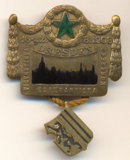 Insigno de la 4-a Universala Kongreso de Esperanto, Dresden 1908